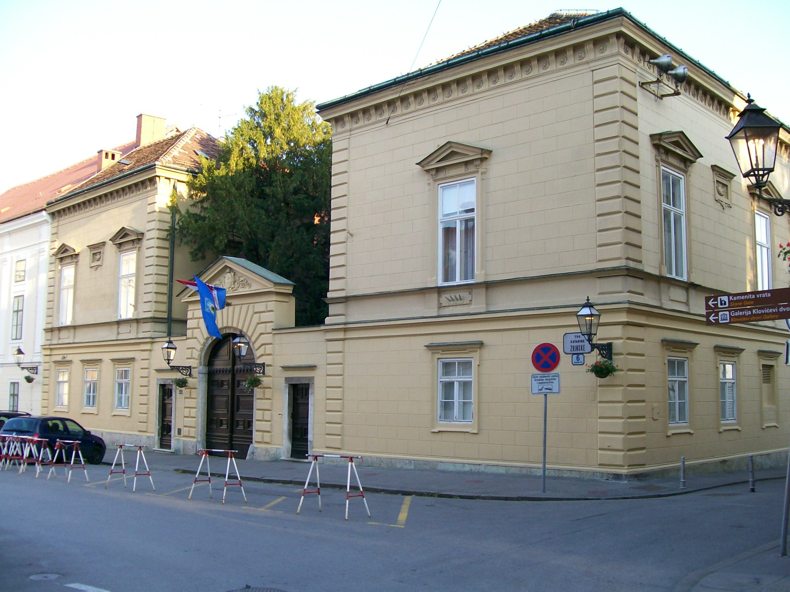 Palača Dverce Zagreb